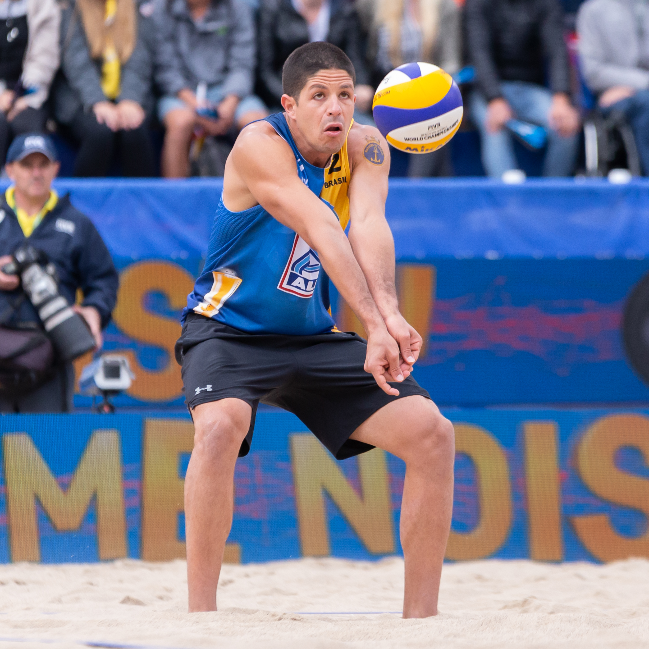 BeachVolleyball Weltmeisterschaft Hamburg 2019; Alvaro Magliano de Morais Filho (BRA, Brasilien)